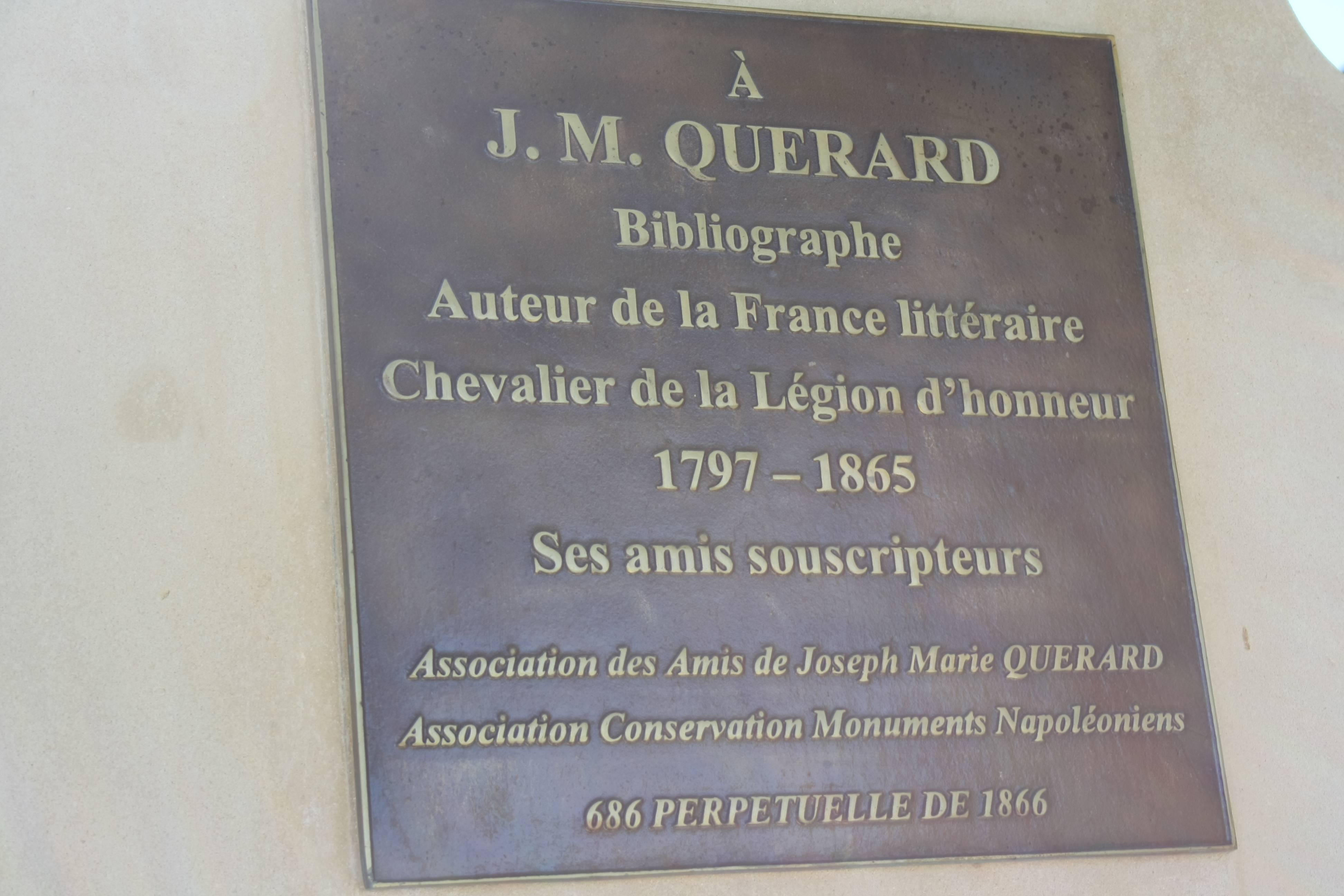 Grab von Joseph-Marie Quérard (1797-1865) auf dem Friedhof Montparnasse in Paris, Gedenktafel